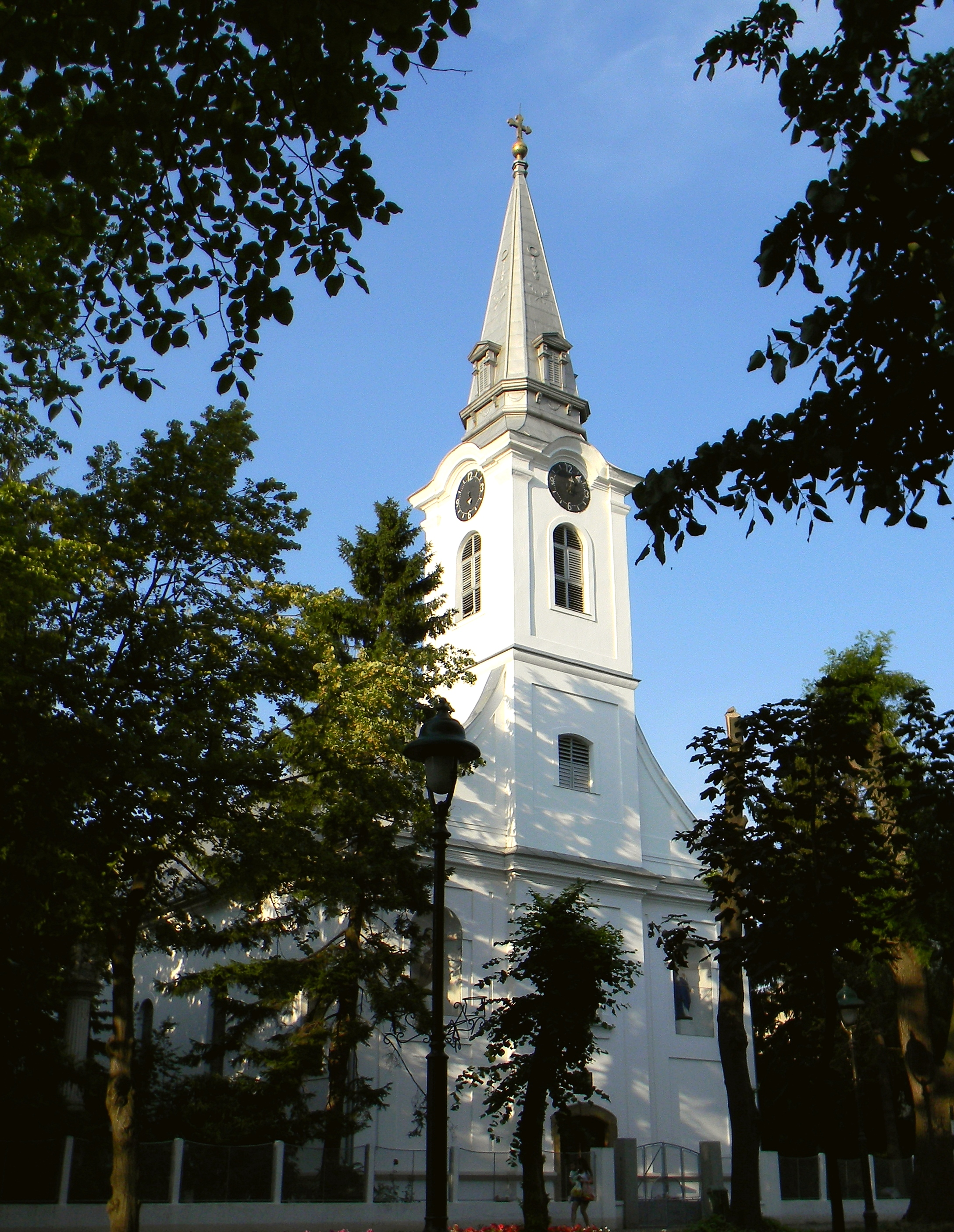 Римокатоличка црква Светог Ђорђа у Кули...